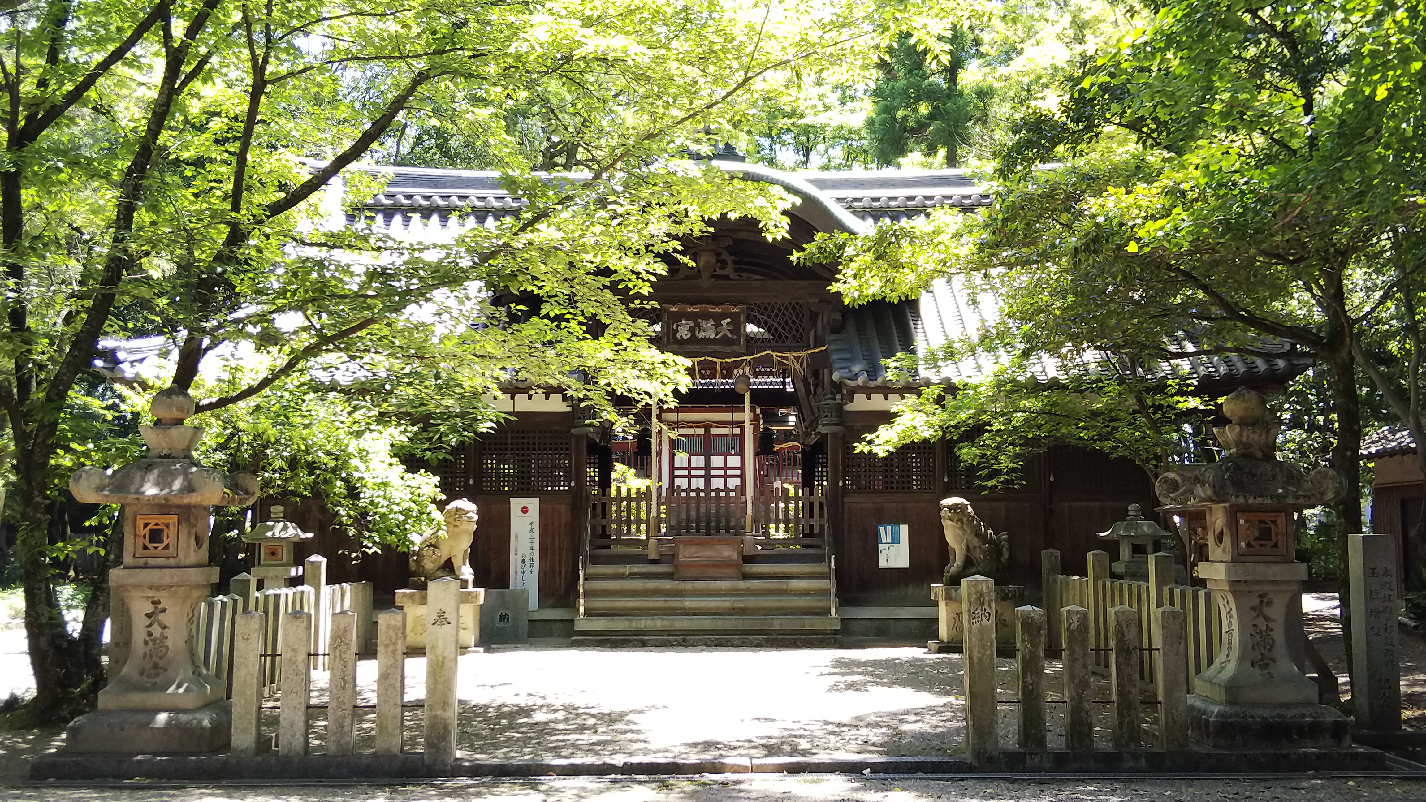 池坐朝霧黄幡比売神社拝殿